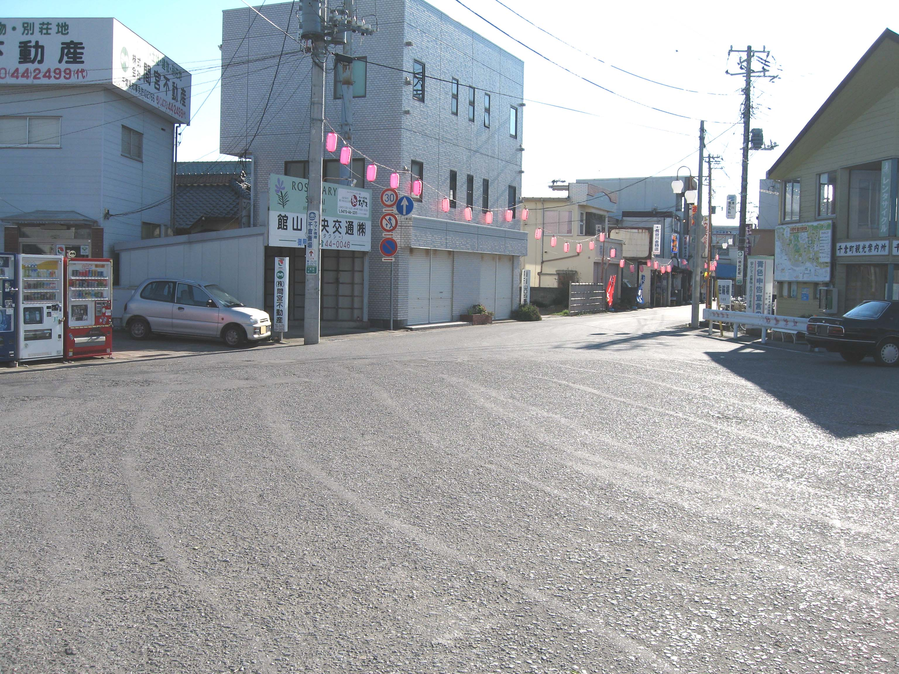 Chikura station, Uchibo Line, Chiba, Japan, 千倉駅駅前１